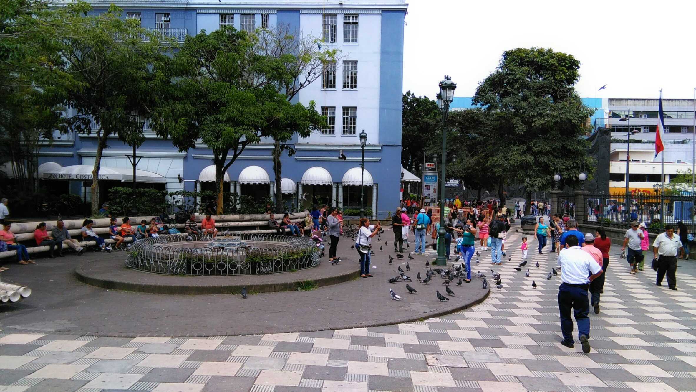 Plaza Juan Rafael Mora Fernández en San José, Costa Rica.